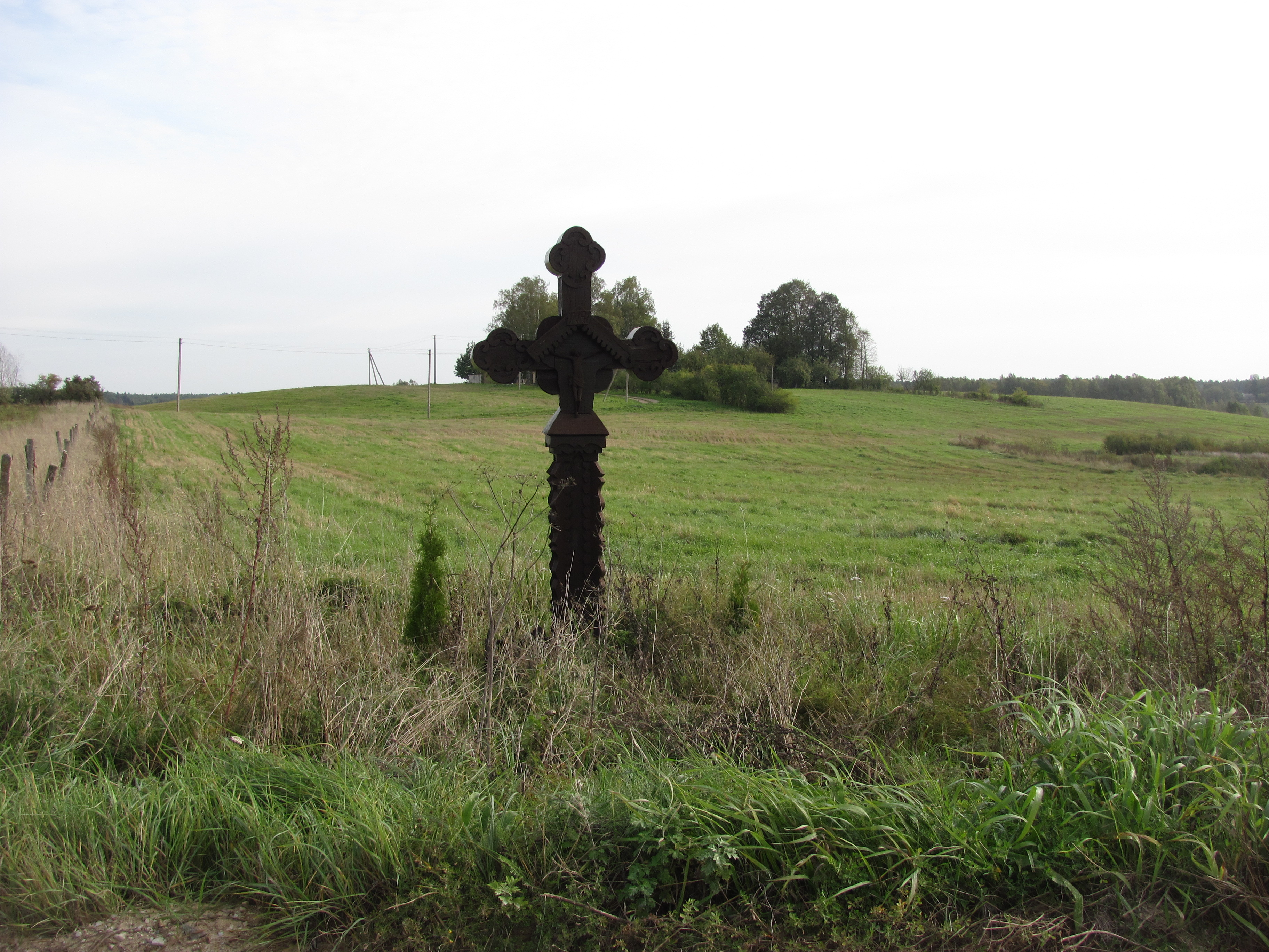 Vyžuonų sen., Lithuania